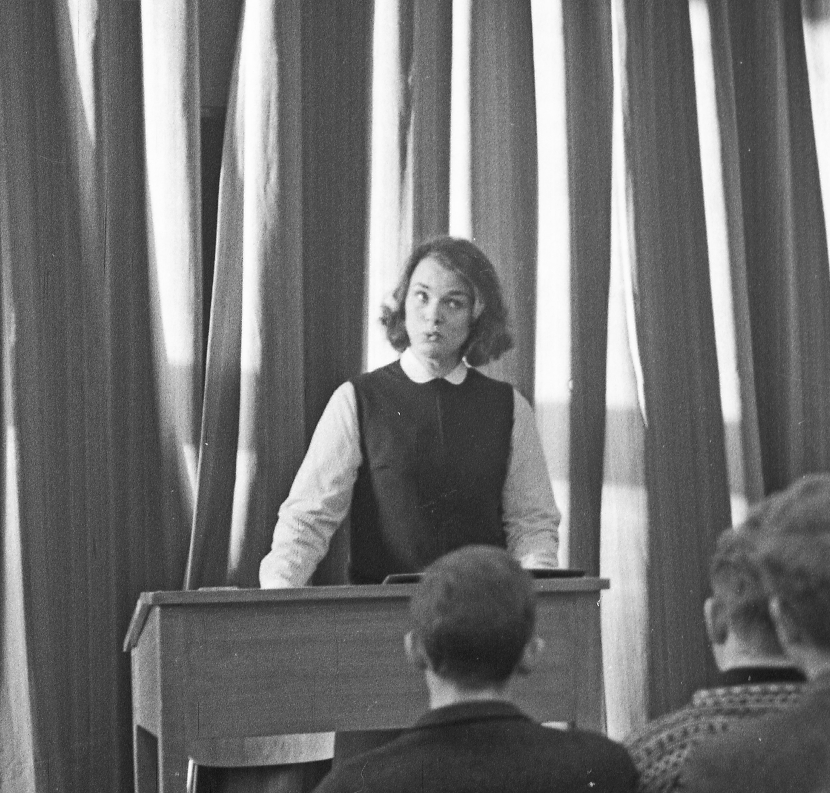 Cropped version of File:Anne Gullestad - Haugtussa (1967) (14665745001).jpg Original description: Format: 120 mm sort/hvitt negativ Dato / Date: 8 Februar 1967 Fotograf / Photographer: Eirik Sundvor (1902 - 1992) Sted / Place: Bergen Katedralskole, Bergen Wikipedia: Anne Gullestad (1925 - 1998) Wikipedia: Haugtussa Eier / Owner Institution: Trondheim byarkiv, The Municipal Archives of Trondheim Arkivreferanse / Archive reference: Tor.H43.B78.F16068 Dagbladet 10 Februar 1967: "Haugtussa" i klasserommet - Hvorfor skulle skolen ikke kunne gjøre seg nytte av at byen har teater og skuespillere som kan levendegjøre litteraturen for elevene også i klasseværelset? spurte lektor Eiliv Eide ved Bergens Katedralskole. Og resultatet var at Anne Gullestad onsdag stod ved kateteret i skolens største sal foran ett hundre elever fra avgangsklassene. Anne Gullestad kom med "Haugtussa", og fortalte og leste, og gav sine unge tilhørere et levende bilde av Arne Garborgs "Alveland" og de tindrende Veslemøy-sangene med deres skiftende stemninger. Det ble en hel liten forestilling som tok to snaue klassetimer, og som elevene fulgte spent med i. Etter hvert er det meningen at også de andre klassene ved katedralskolen skal få høre det samme "Haugtussa"-programmet, som Anne Gullestad for øvrig har lagt opp med tanke på ungdomslagene. Hun kommer til å framføre programmet i ungdomslagene ved arrangementer til inntekt for et vordende nynorsk teater i Bergen, som det allerede er i gang et intenst arbeid for og som Anne Gullestad selv er sterkt opptatt av.